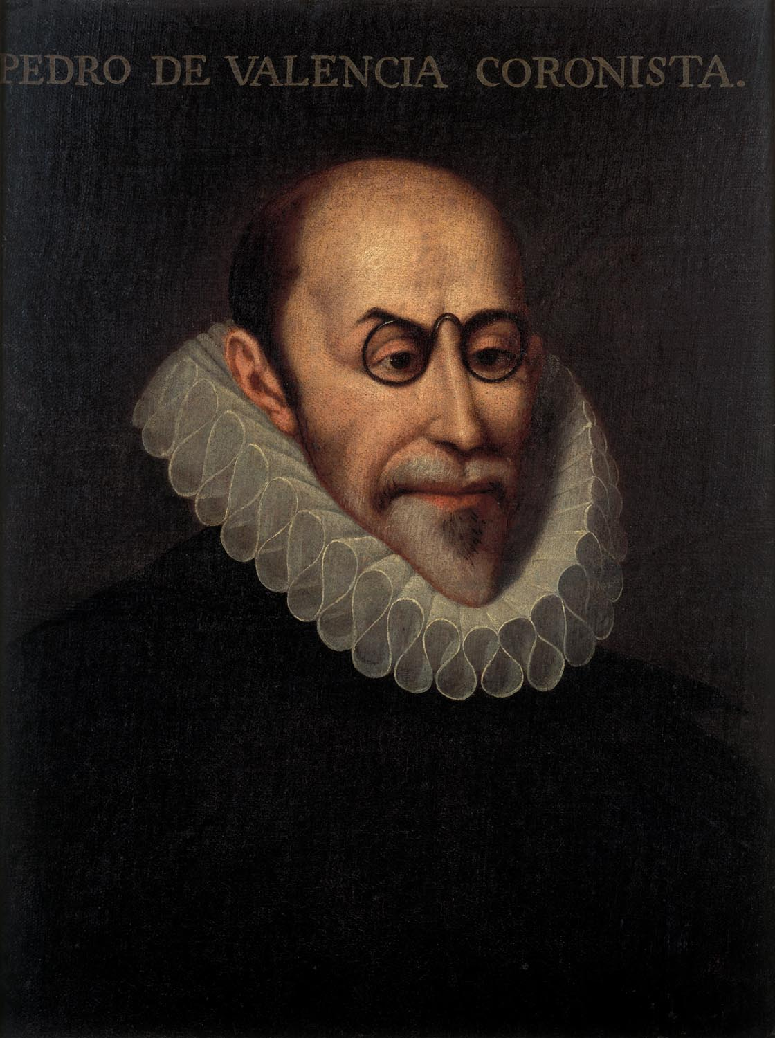 Retrato del humanista y escritor español Pedro de Valencia (1555-1620), que también fue hebraísta, crítico literario, filósofo, traductor e historiador y cronista del rey Felipe III de España.